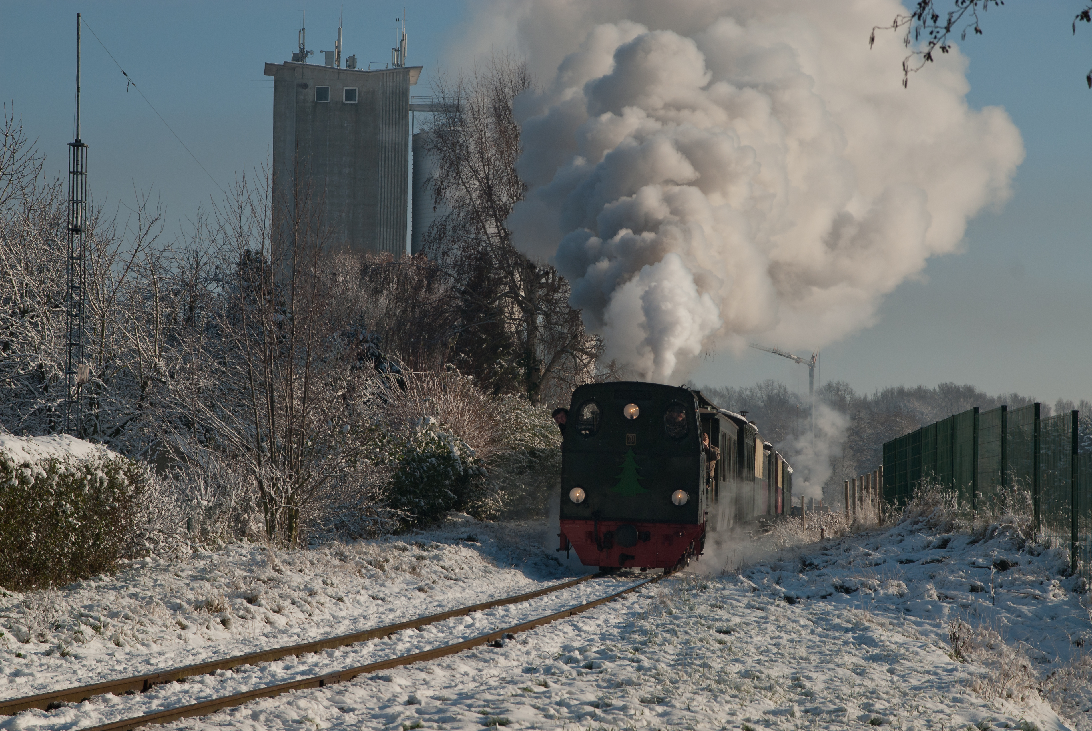 Ausfahrt eines Nikolauszuges der Selfkantbahn aus dem Bahnhof Gillrath, Zuglok: Lok 20 "Haspe"